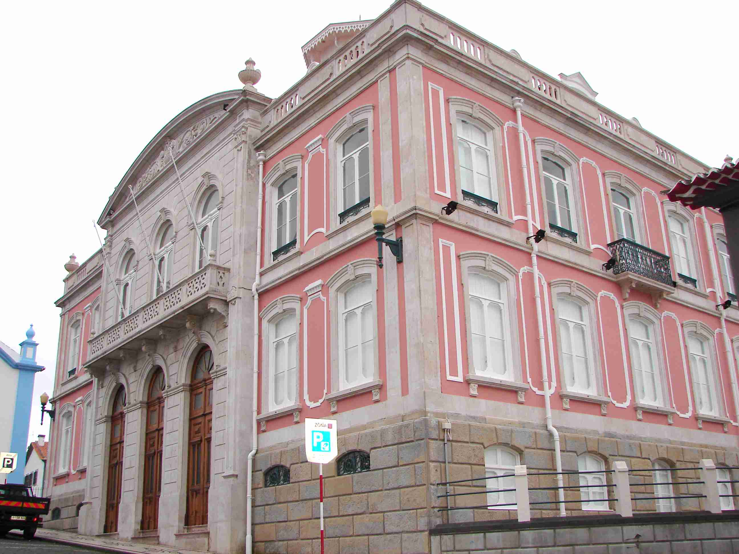 Palacete Silveira e Paulo, vista parcial da fachada, Angra do Heroísmo, ilha Terceira, Açores, Portugal.